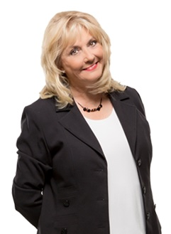 Photo officielle Diane Délisle